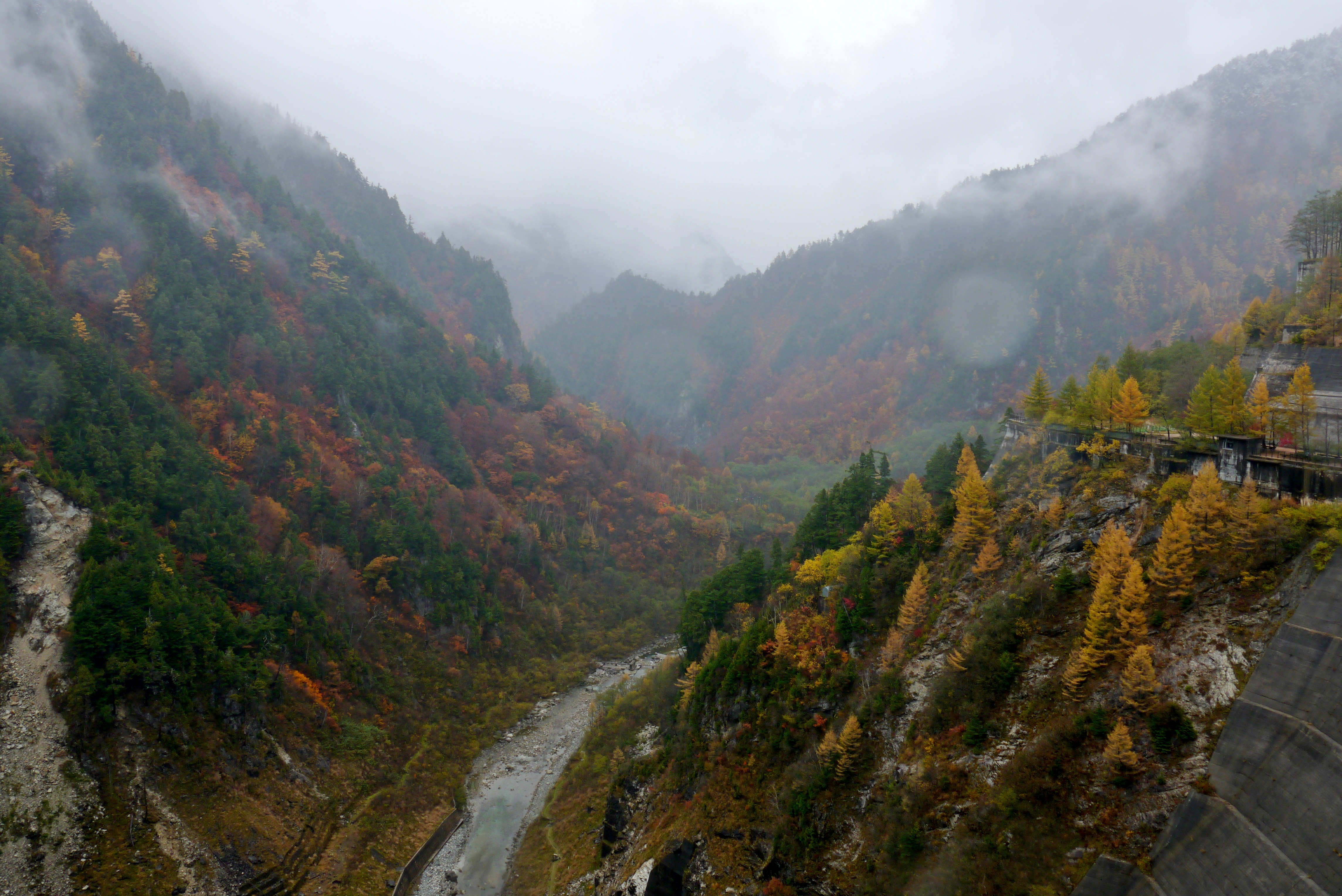 黒四ダムからの黒部川